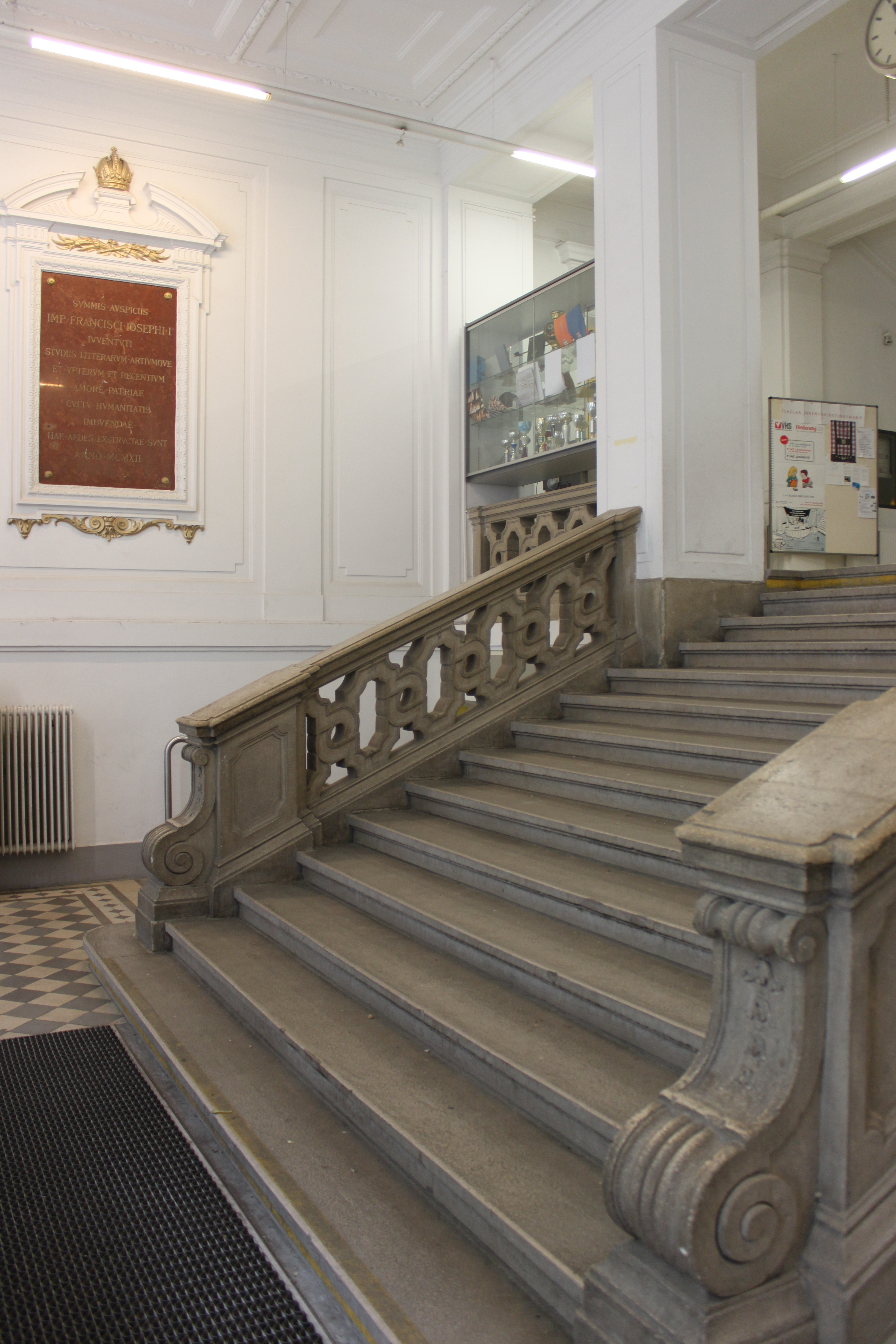 Gymnasium Stubenbastei, Vestibül mit Treppe, links oben in der linken Wand die Marmortafel mit der Bauinschrift